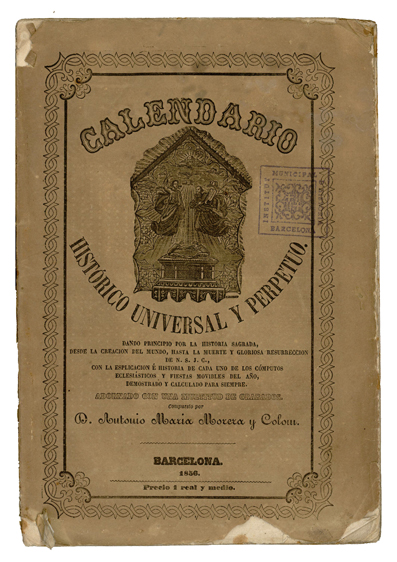 Portada del Calendario Histórico, Universal y Perpetuo de 1856